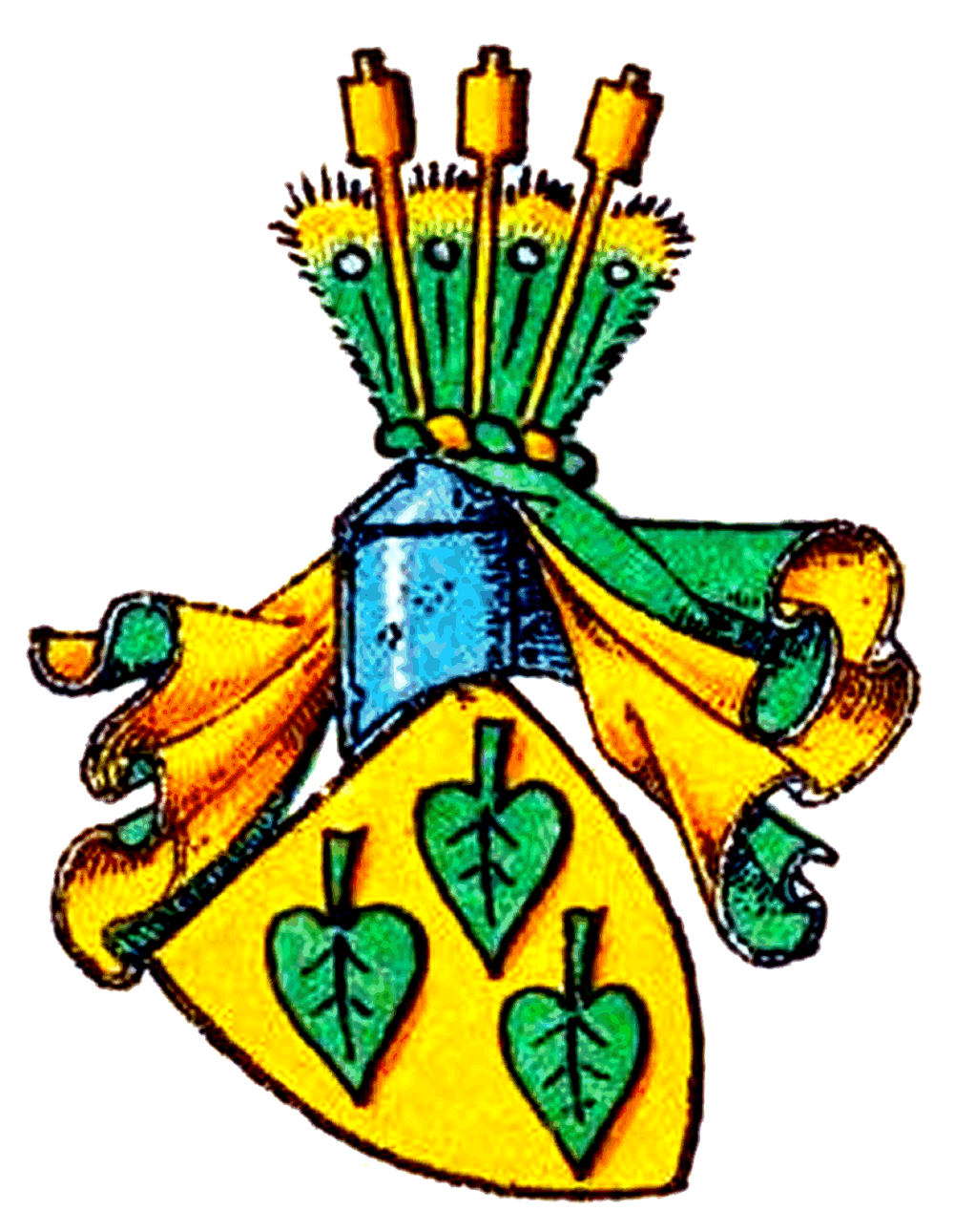 Stammwappen derer von der Pahlen